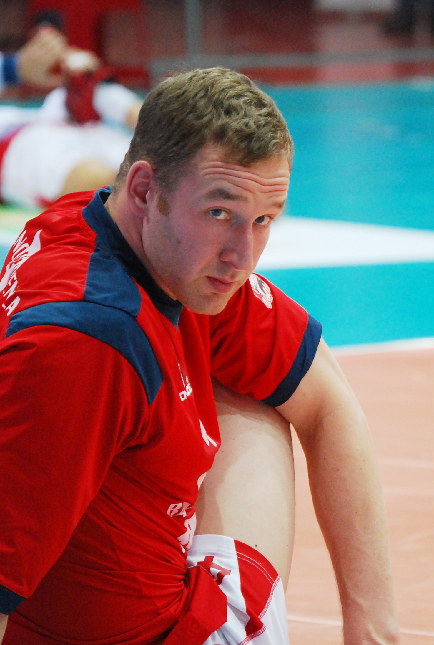 Jiří Král durante una partita di campionato